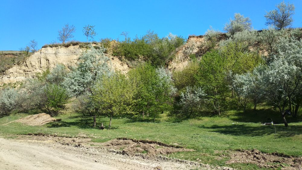 Afloriment de argile etuliene, monument al naturii amplasat în Găgăuzia, panta stângă a văii râului Cahul deasupra satului Etulia (cod MD-GE-mn.A-084) A-084